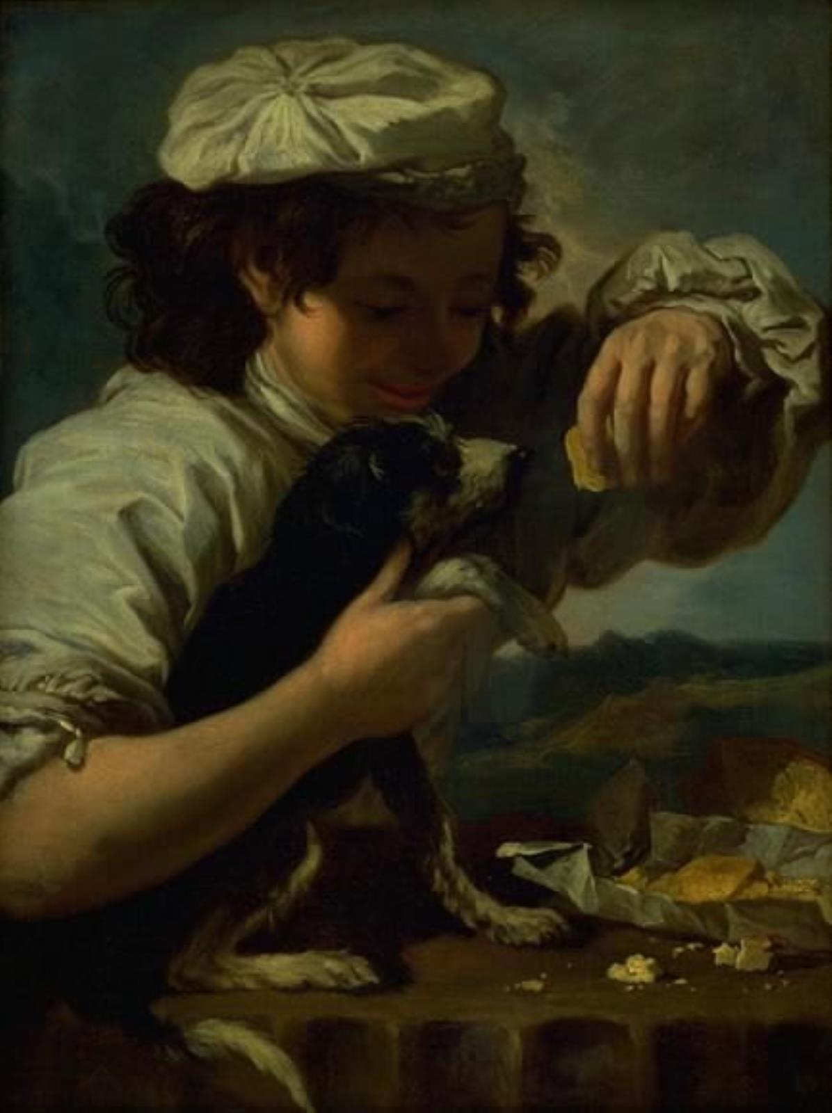 Bernardo Eberhart Keilhau (1624-1687), Dreng med en hund. (Allegori paa "Smagen"), Omkring 1653